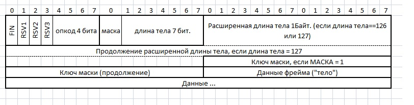 формат rfc фрэйма для web socket